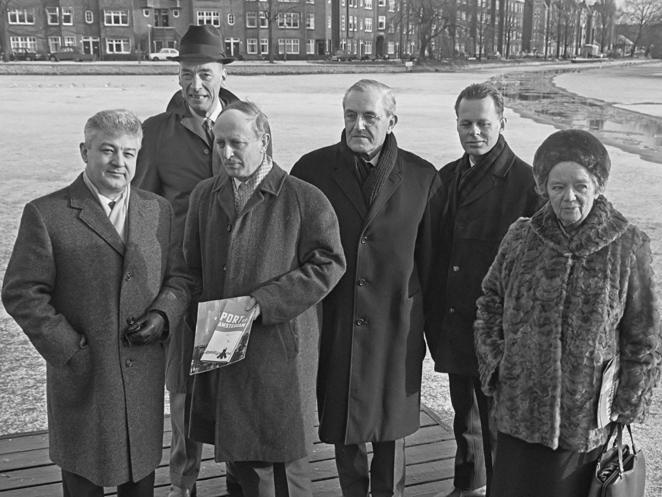 Jury voor de prijsvraag van het stadhuis van Amsterdam. V.l.n.r. architect prof. H. Schader, architect Huig Maaskant, stadsbouwmeester Chris Nielsen, J. Pedersen (stadsbouwmeester Kopenhagen), architect Frans van Gool en stedenbouwkundige mej. Jacoba (Ko) Mulder 13 januari 1968